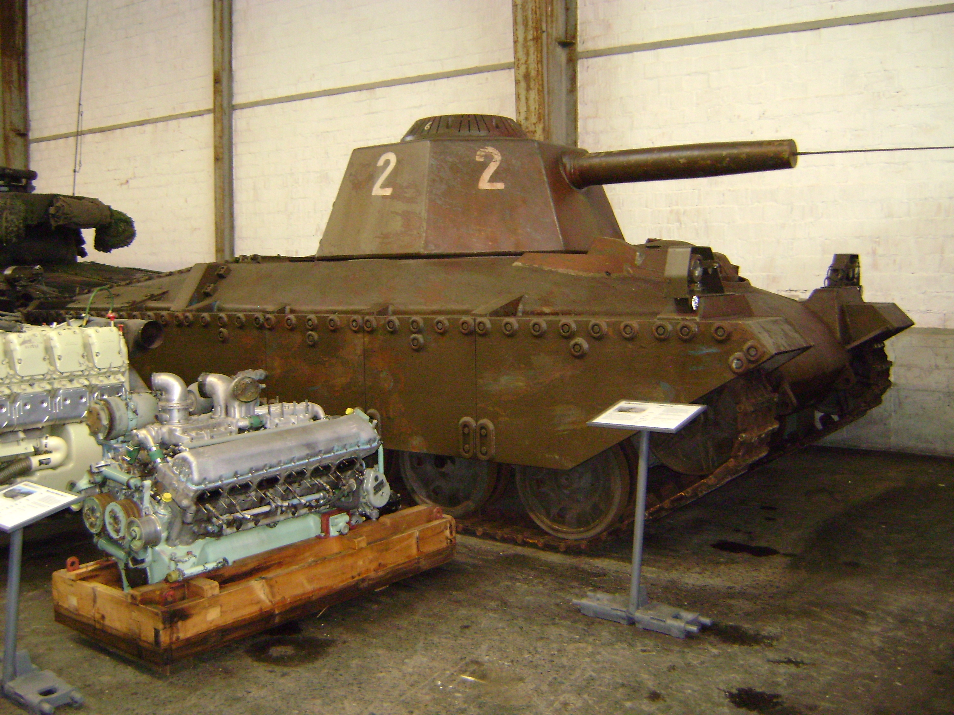 zielpanzer